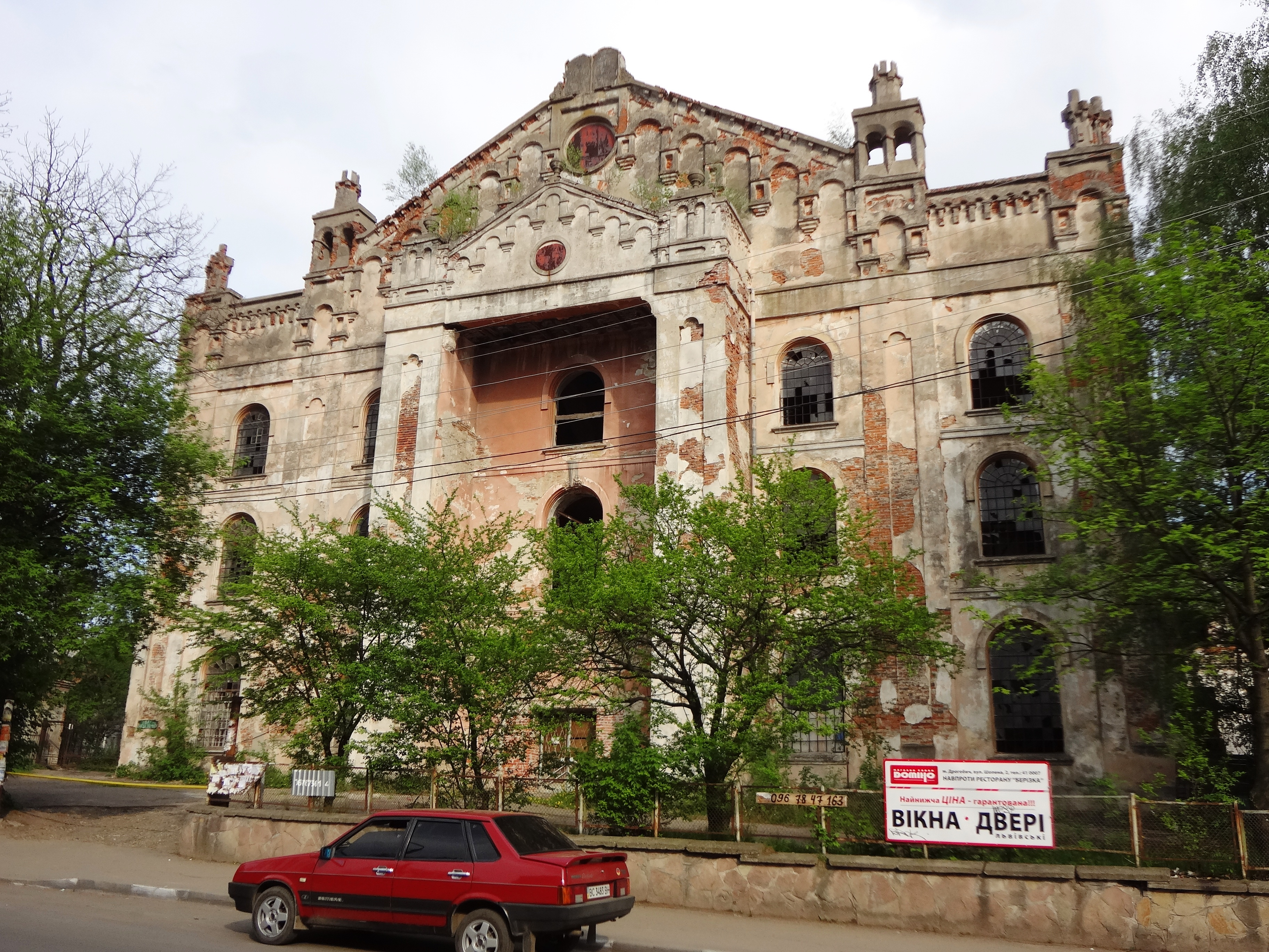 Хоральна синагога (Дрогобич), Дрогобич, вул. П. Орлика, 6